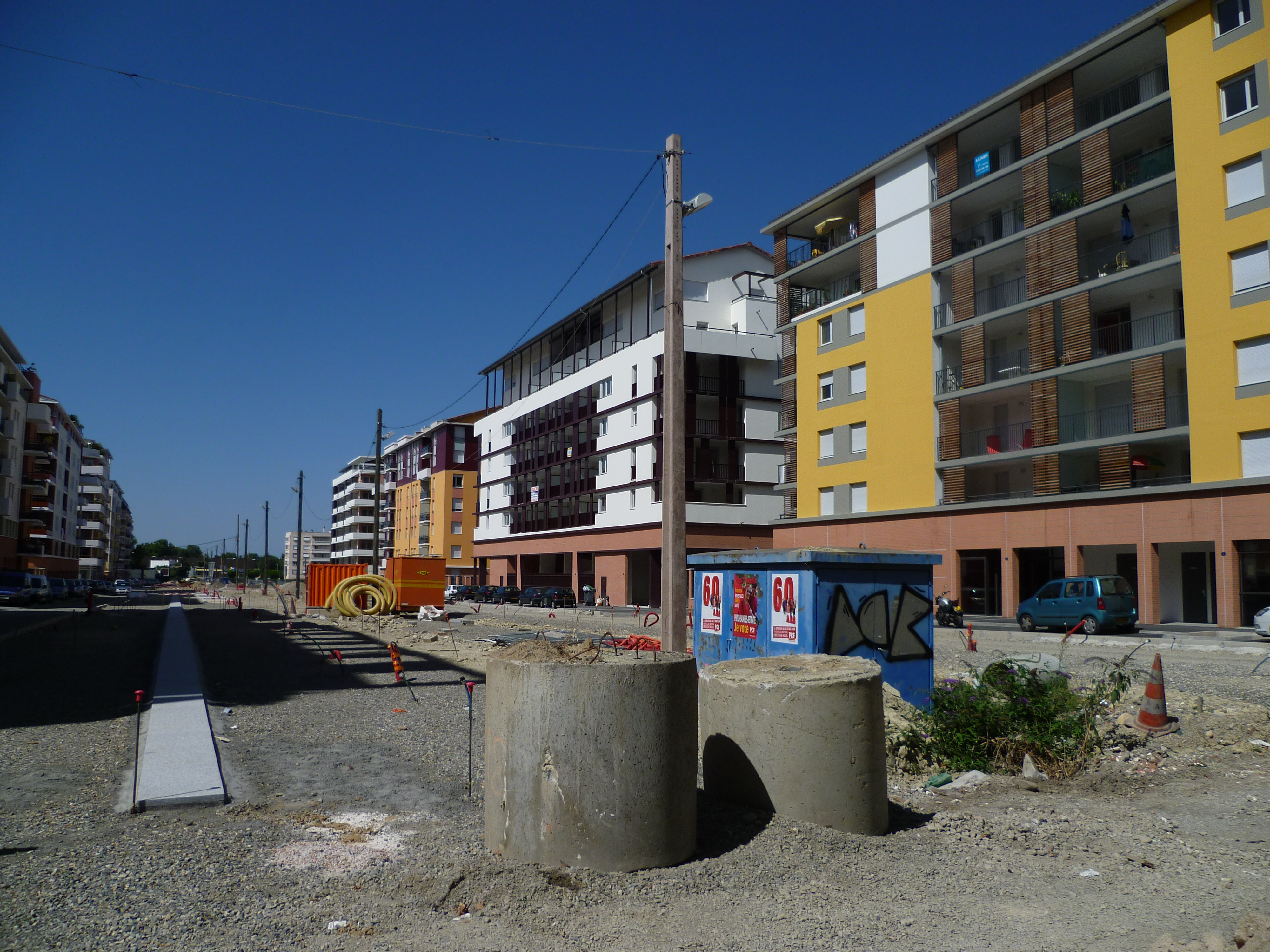 Nouveaux immeubles et nouvelle rue (rue Cécile Brunschvicg) à Toulouse.